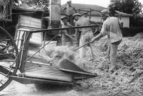 גן-שמואל - דיש תבואה בגורן הראשון-החצר הגדולה - 1940.